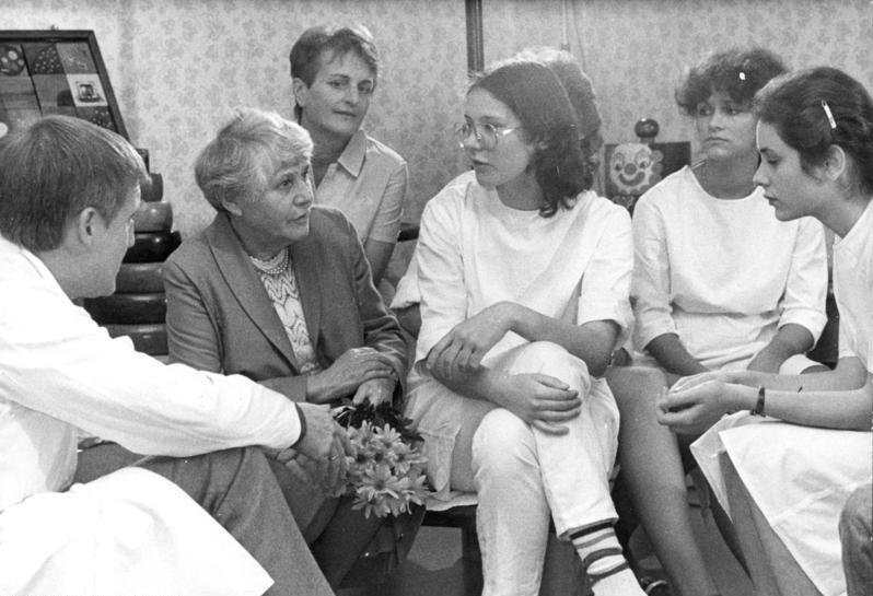 Cottbus, Prof. Ingeborg Rapoport ADN-ZB/Weisflog/ 30. 10. 85 / Cottbus: Vertreter des Komitees "Ärzte der DDR zur Verhütung eines Nuklearkrieges" besuchten das Bezirkskrankenhaus Cottbus. Sie führten Gespräche in verschiedenen Bereichen des Hauses - Prof. Dr. Ingeborg Rapoport diskutierte z.B. mit Schwestern des Kinderklinik. Anschließend fand ein Friedensmeeting im Krankenhaus statt. Abgebildete Personen: Rapoport, Ingeborg Prof. Dr.: Kinderärztin, Charité Berlin, DDR (GND 120997363)